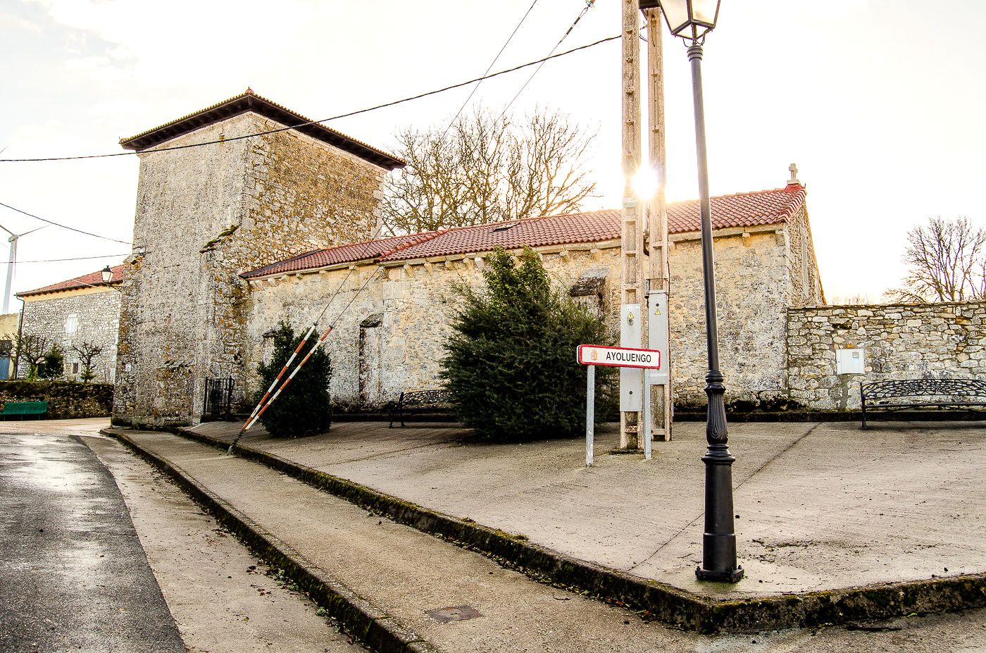 Iglesia de San Mamés de Ayoluengo. Cara norte. Entrada del pueblo. Febrero de 2017.